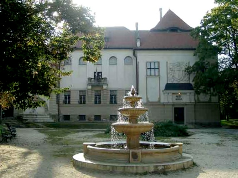 Balassagyarmat Palóc múzeum. Tervező: Wälder Gyula 1914 This is a photo of a monument in Hungary, Identifier: 6513